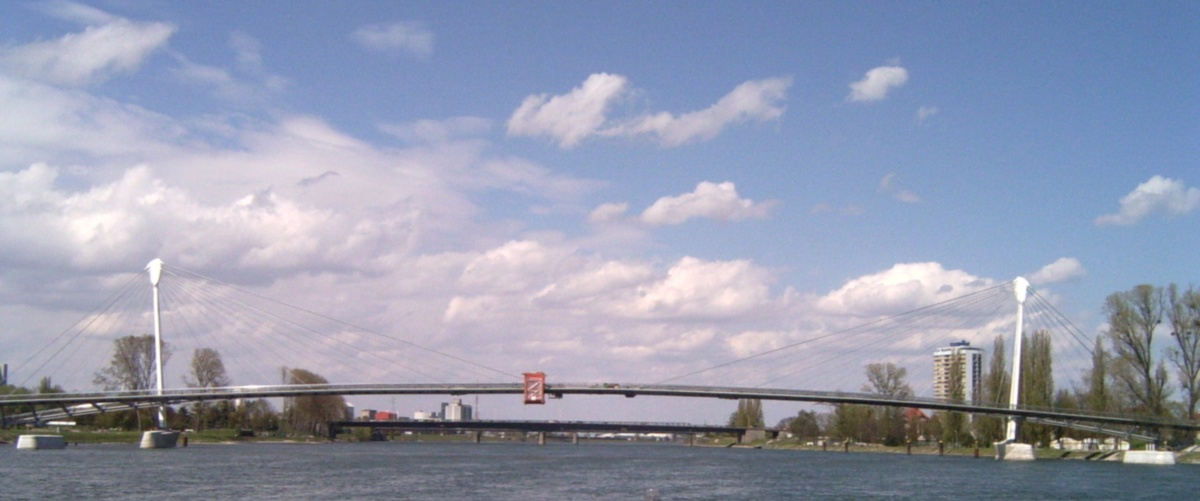 Neue Fußgängerbrücke über den Rhein in Kehl kurz vor der Fertigstellung